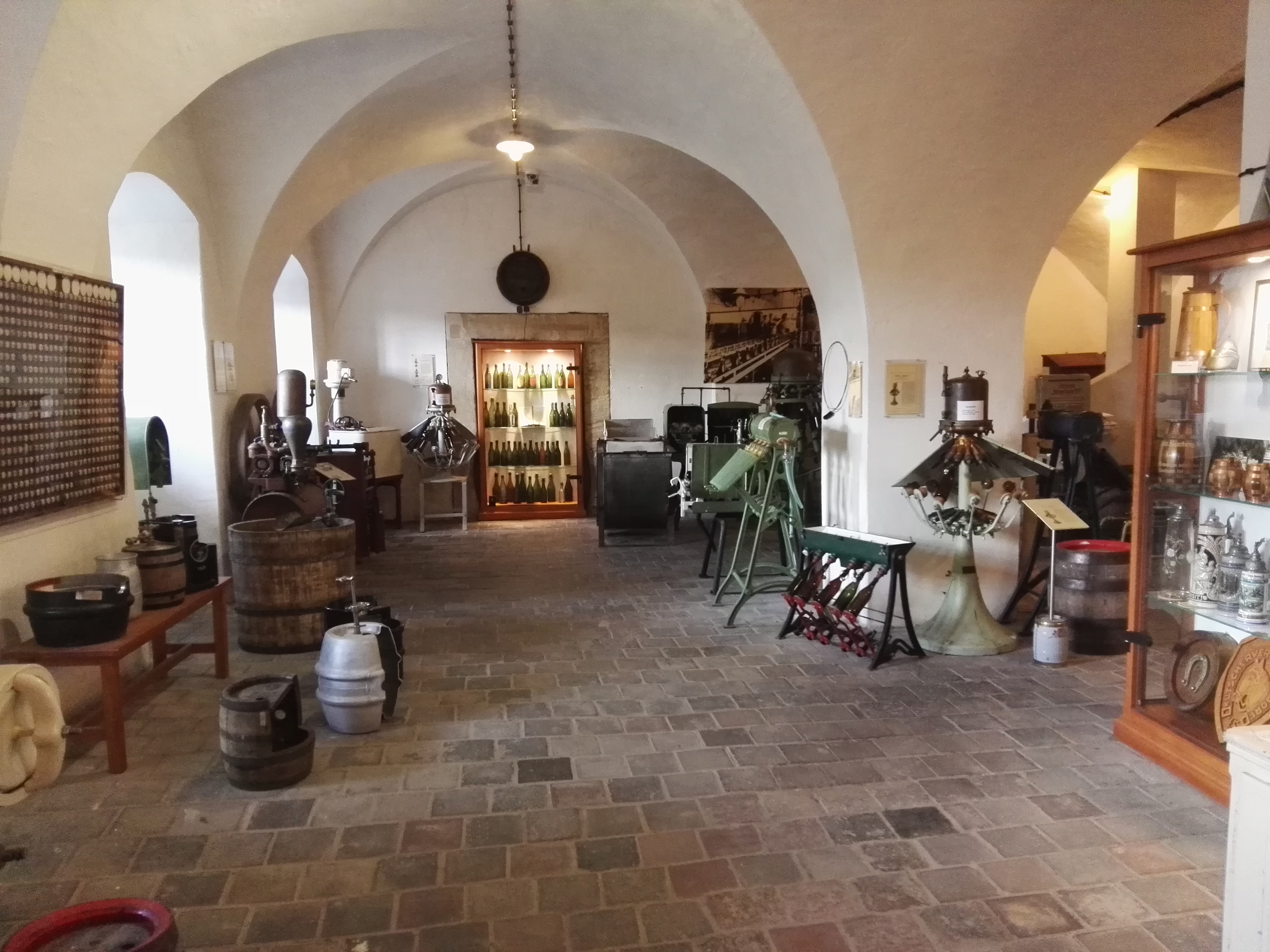 Ausstellungsraum des Fränkischen Brauereimuseums in Bamberg